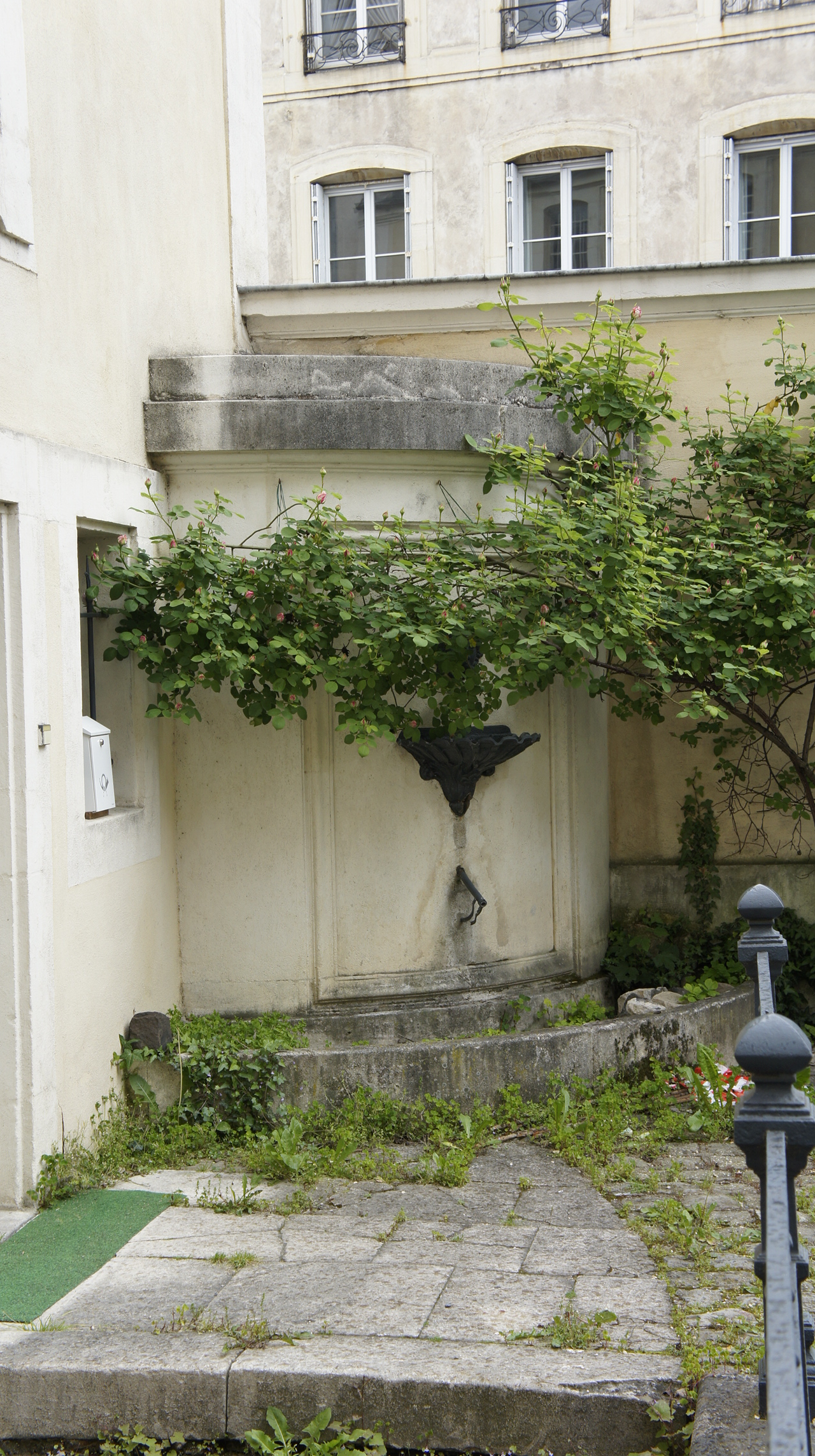 hôtel des Loups ou Hôtel de Curiel .